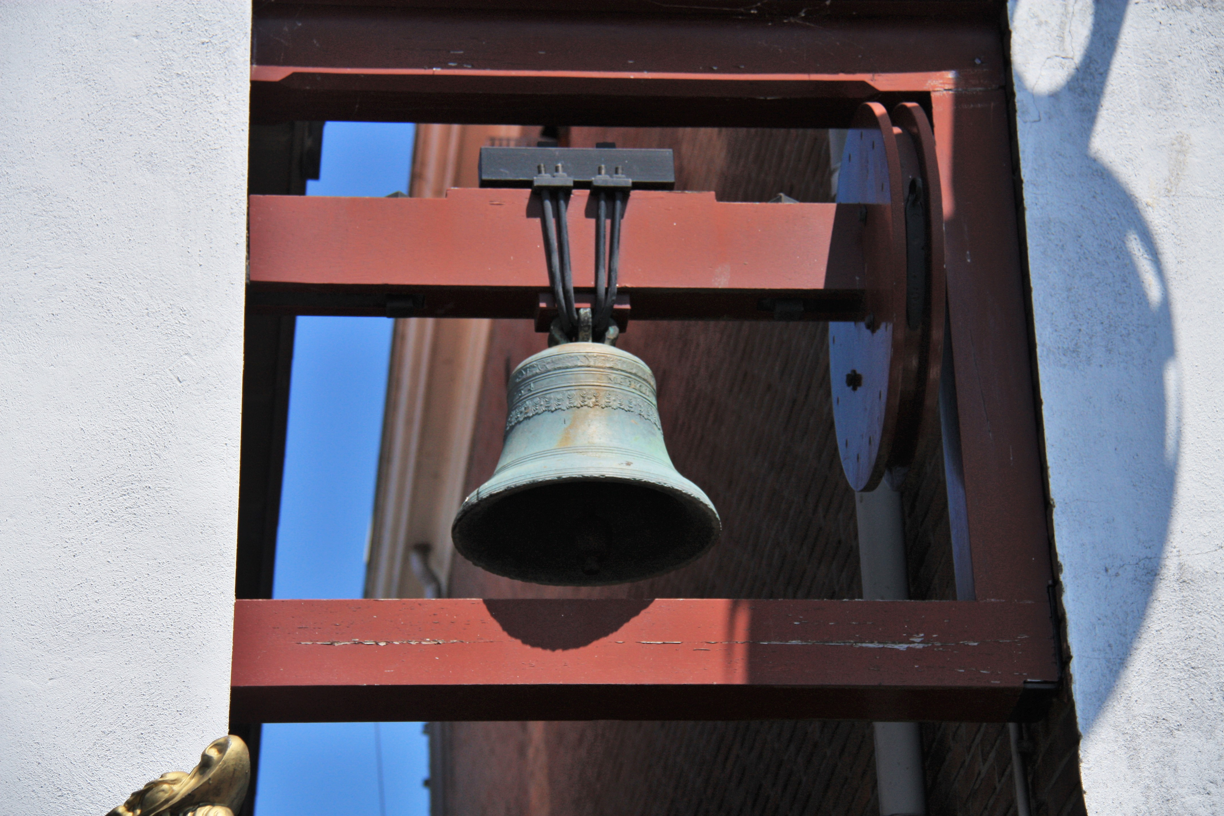 "Овечій дзвін" між будинками на площі Бестенмаркт